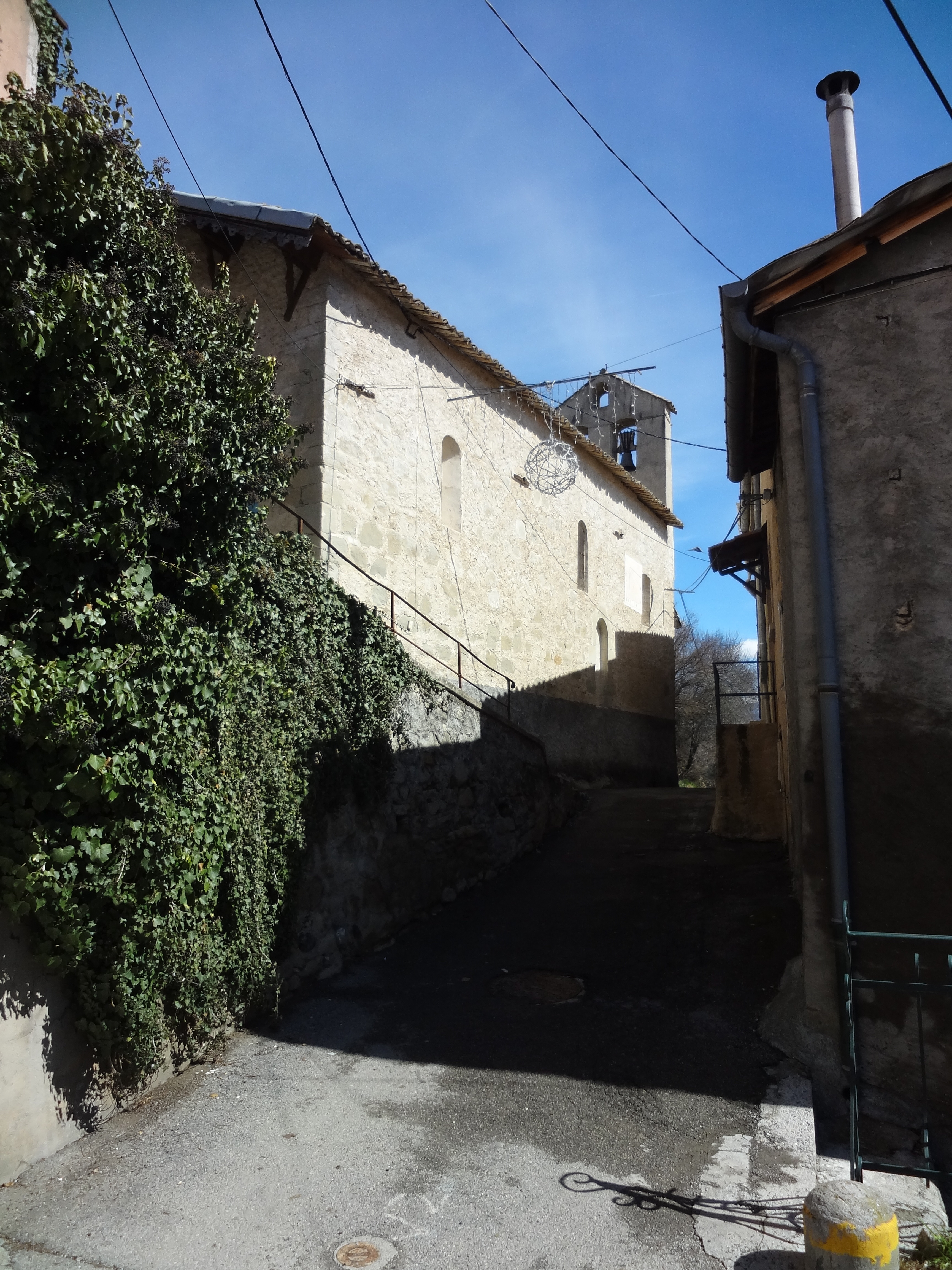 mur sud-ouest